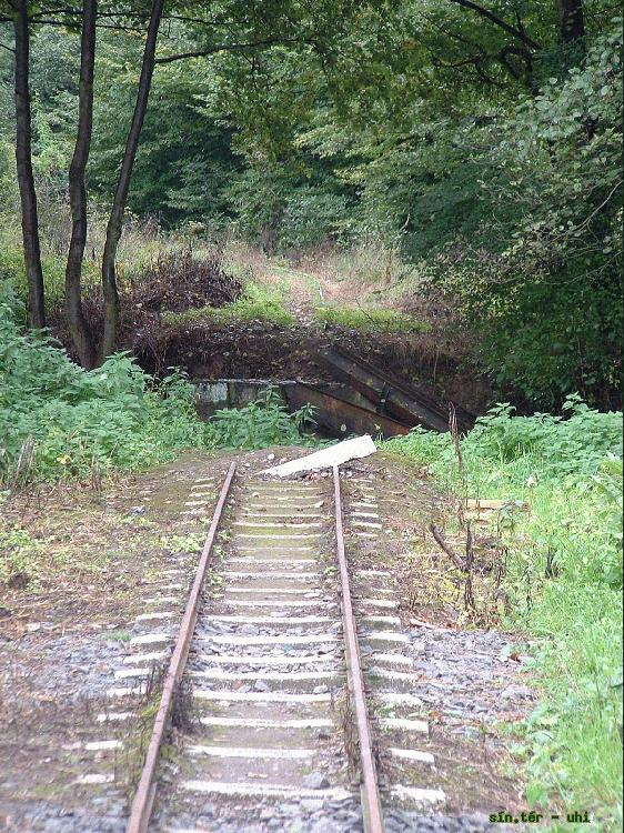 Kemencei Kisvasút, 2002, az elmosott egyes híd